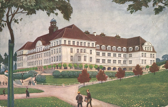 Ravensburg, Spohn-Gymnasium, Ansichtskarte, gelaufen 1914, Verlag: Dorn'sche Buchhandlung Ravensburg; rückseitige Beschriftung: Ravensburg, Spohn'sche Familienstiftung, Gymnasium & Oberrealschule-Neubauten